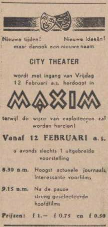 Bioscoopadvertentie uit 1937 (Soerabaja)